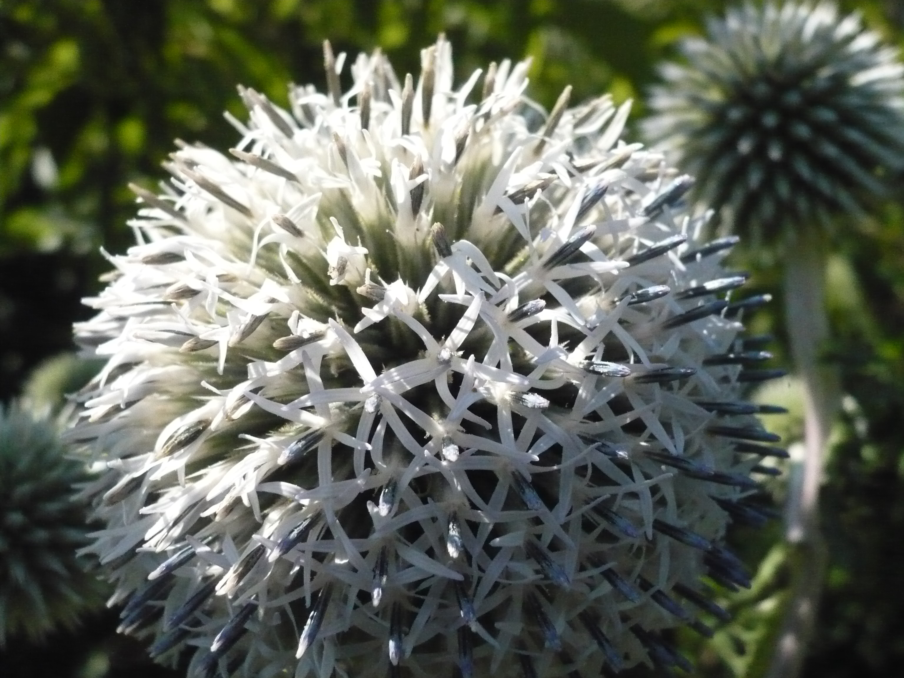 Мордовник шароголовый. Окрестности Пензы, Россия